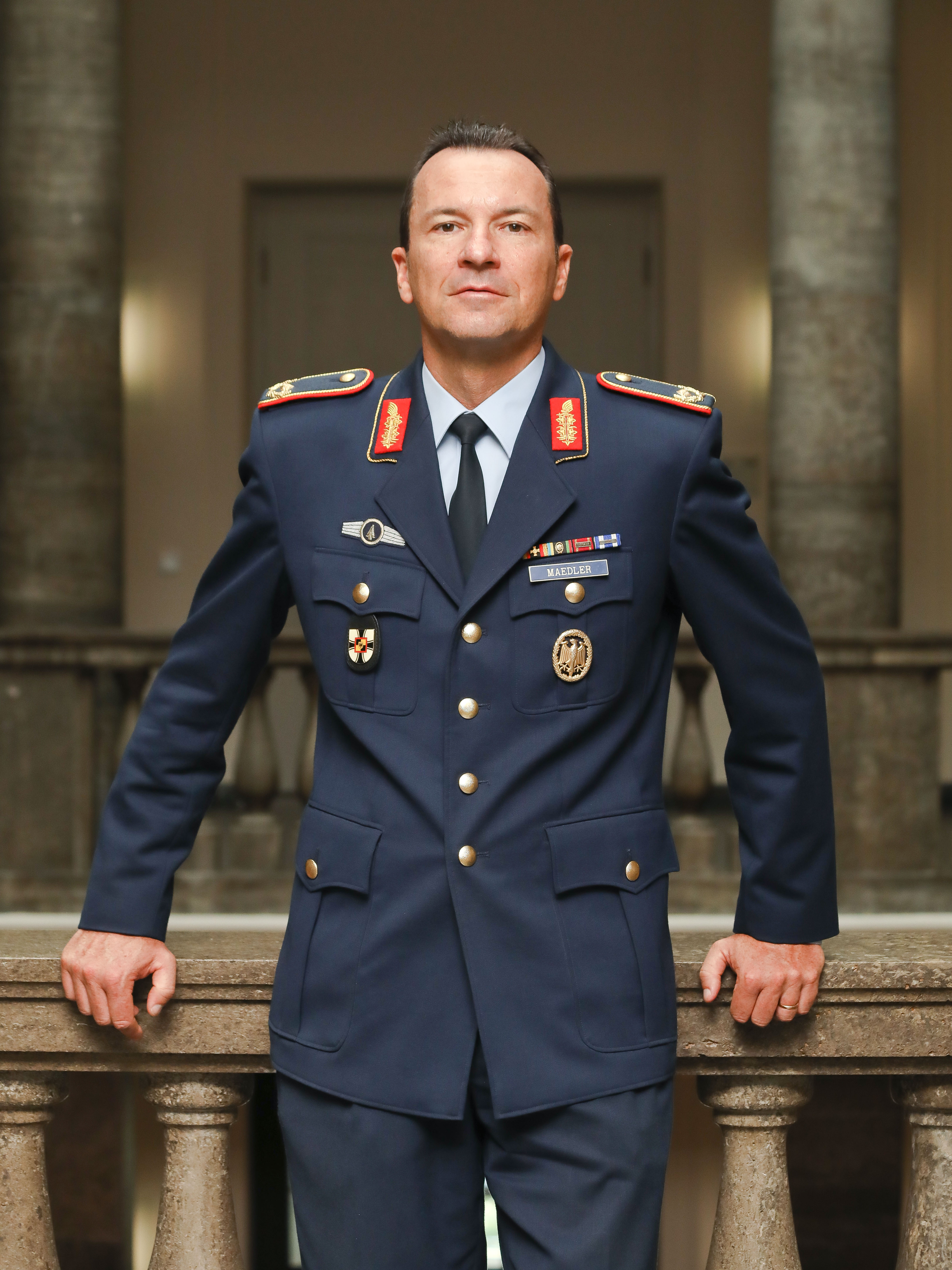 Brigadegeneral Tilo Maedler